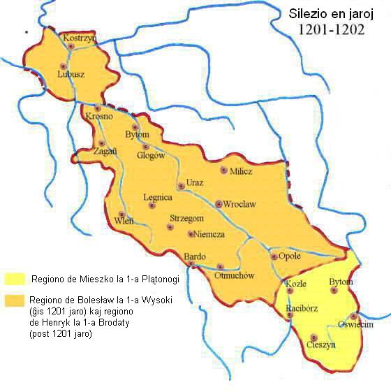 Mapa Śląska w latach 1201-1202 z opisami a języku esperanto.